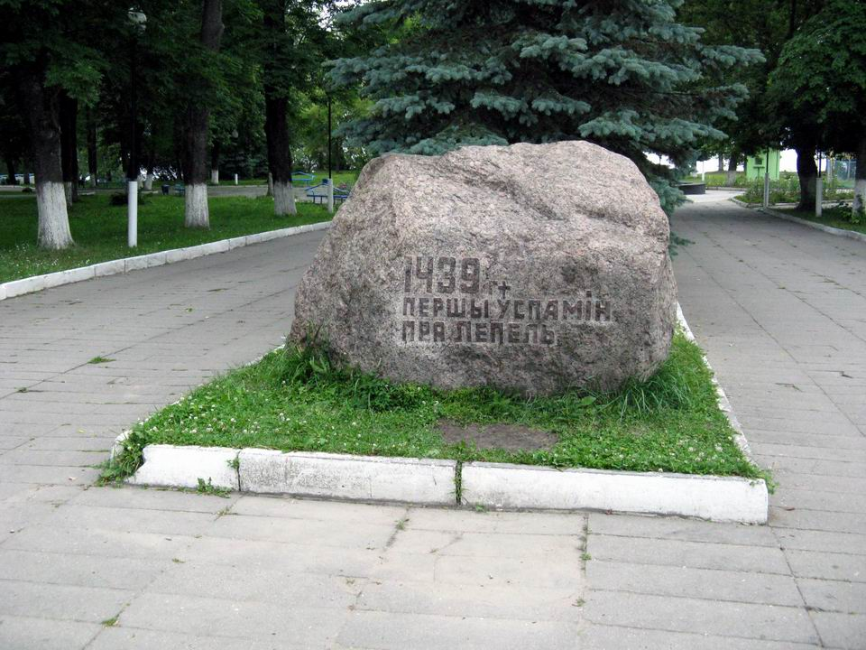 Беларуская (тарашкевіца): Лепель